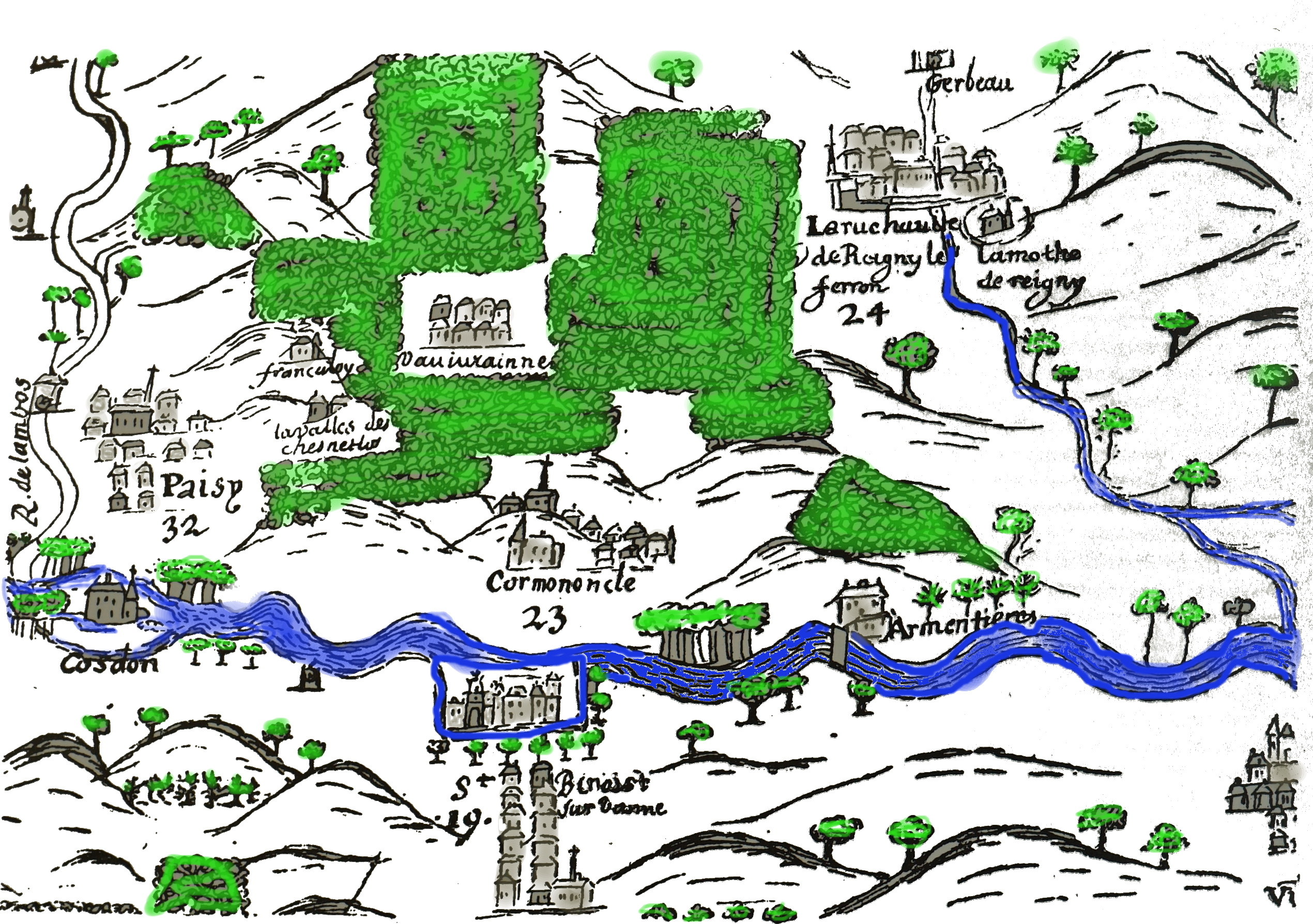 à st-Benoist.